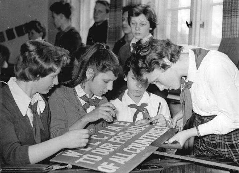 Tessin, Anfertigen von Schildern für Friedensfahrt Zentralbild 25.3.61. Mit großer Sorgfalt...fertigen Junge Pioniere, Jungfen und Mädchen von der polytechnsichen Oberschule Tessin Plakate an, auf denen die Friedensfahrer herzlich willkommen geheißen werden. Tessin ist die erste Stadt des Bezirkes Rostock, die die Fahrer am 8.Mai passieren werden.